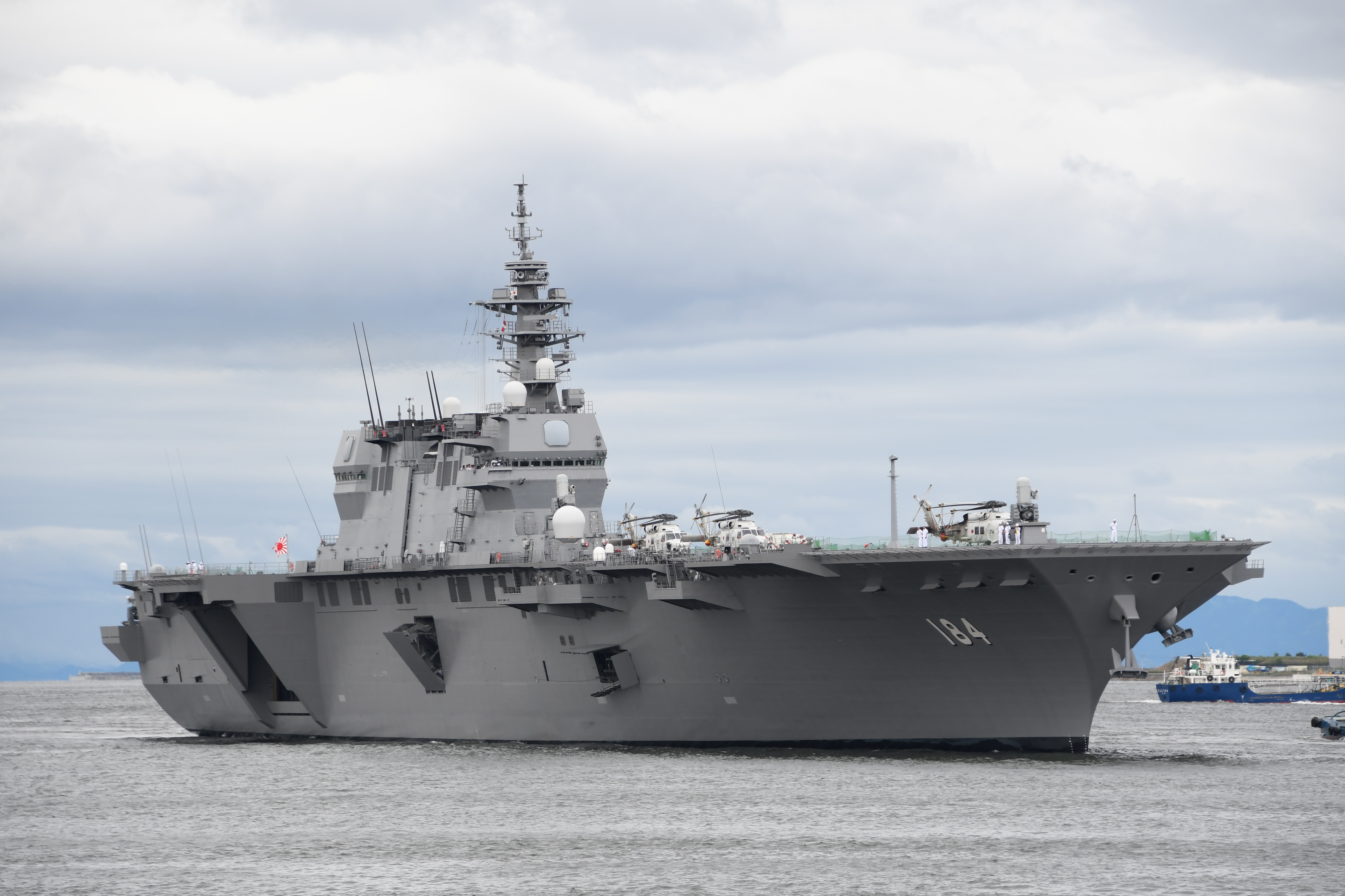 海上自衛隊 ヘリコプター搭載護衛艦かが（DDH-184） 右舷前面。2018年5月19日 大阪港にて。